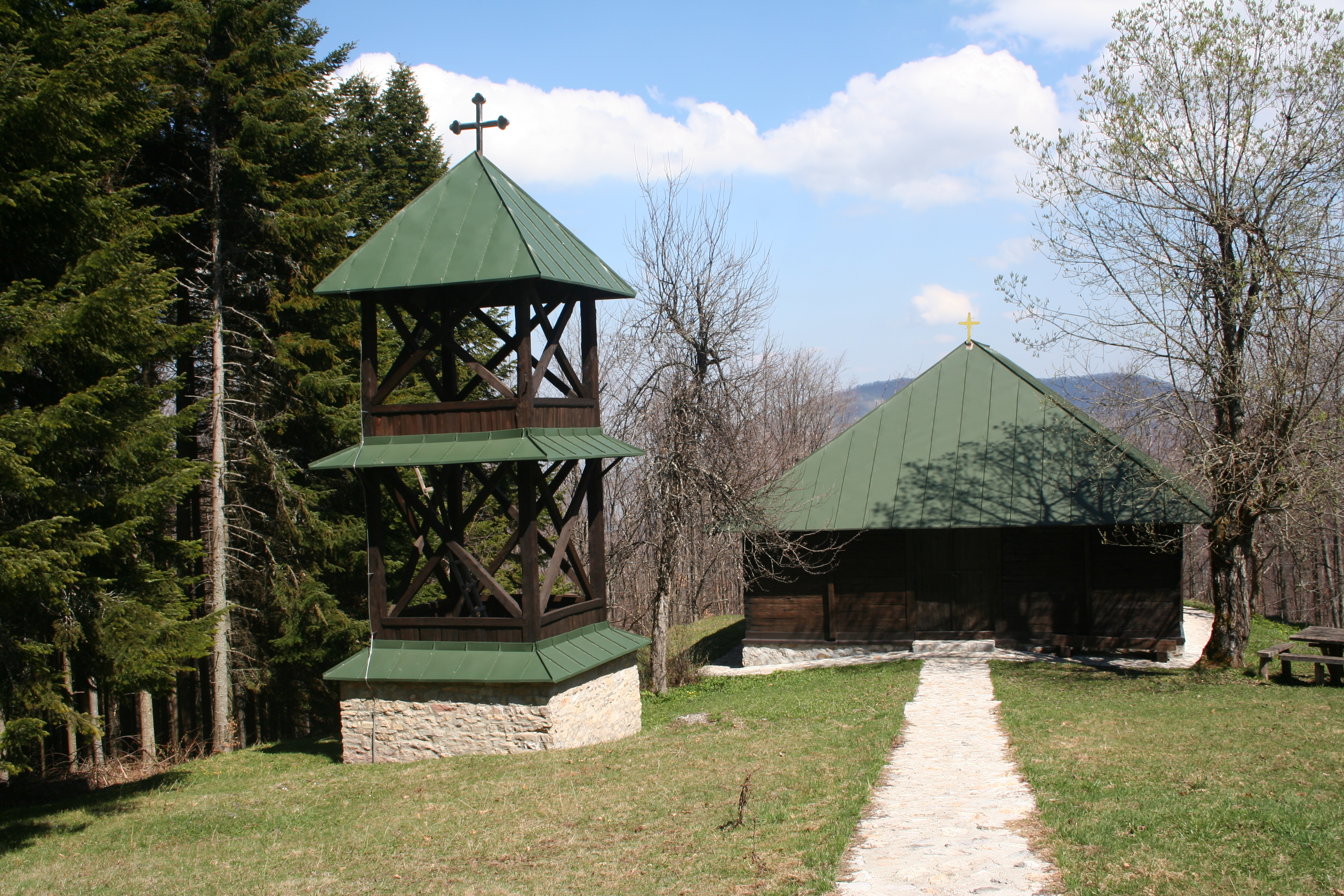 Crkva brvnara na Bobiji